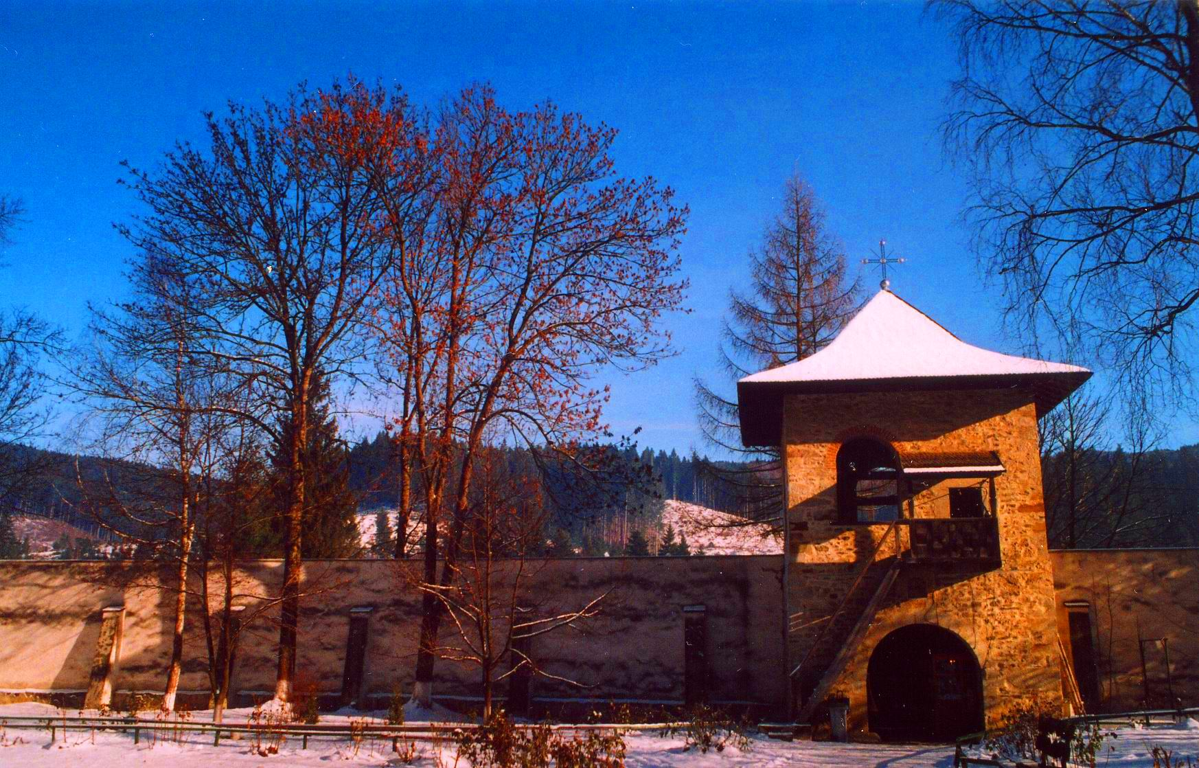 Mănăstirea Voroneț - Clopotnița 03